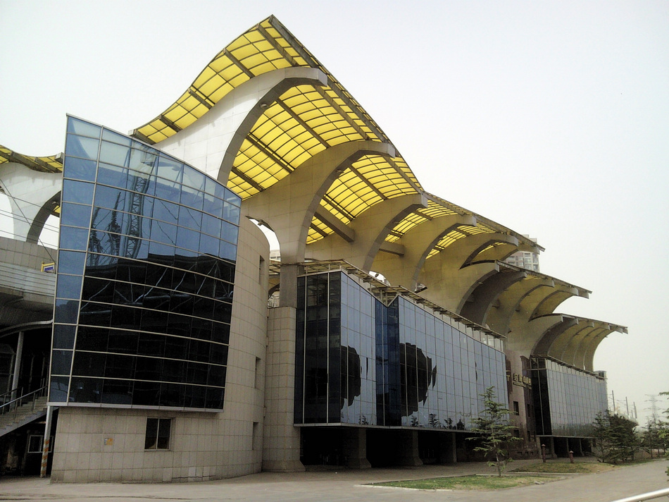 中文（中国大陆）: 会展中心站（地铁津滨线）